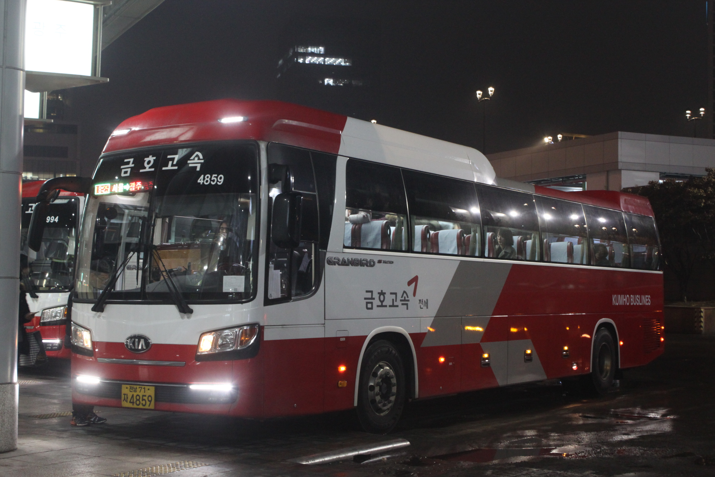 금호고속 전세부 소속 뉴 그랜버드 실크로드